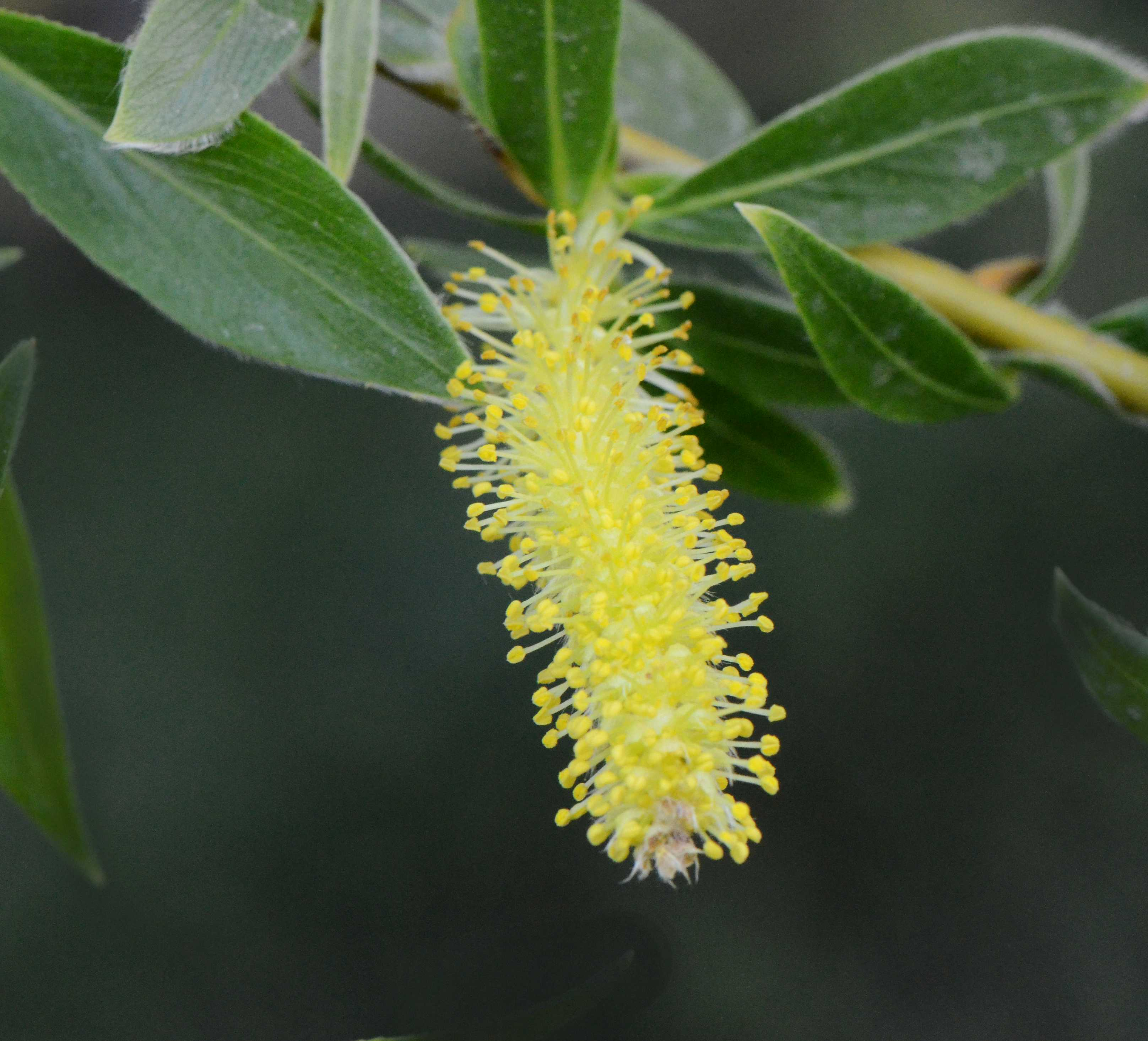 Salix alba subsp. vitellina, chaton mâle, Jardin des Plantes de Paris